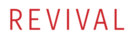 Logo "REVIVAL"